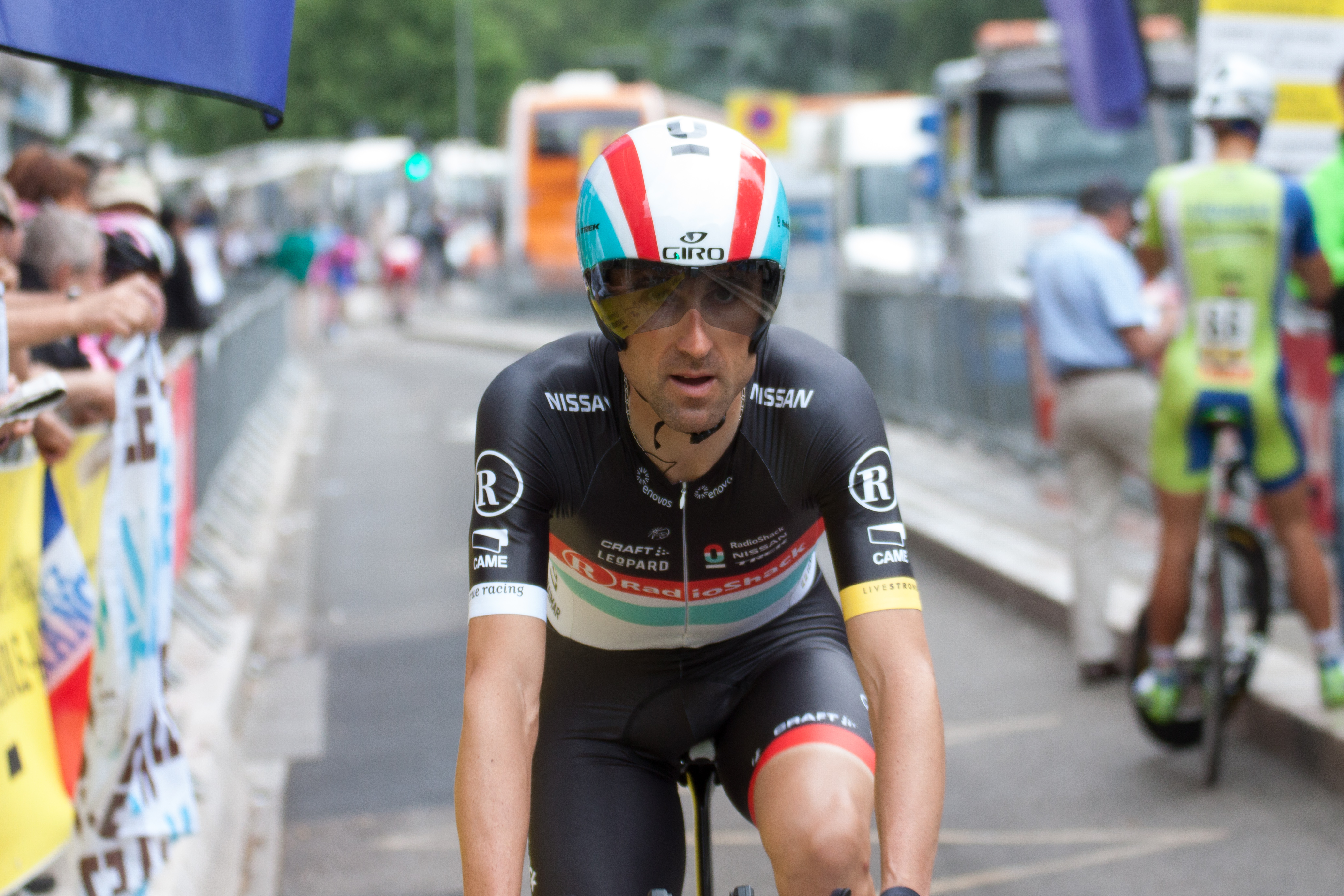 Haimar Zubeldia lors du Prologue du Critérium du Dauphiné 2012